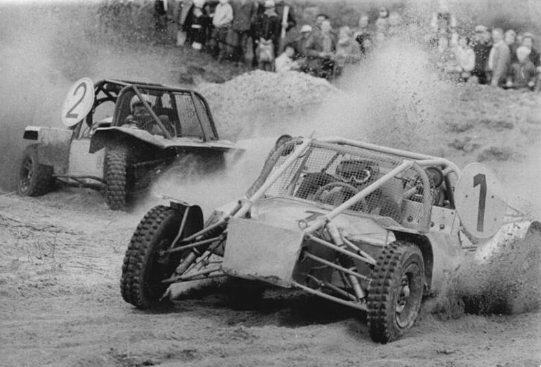 Berlin, 7. Berliner Auto-Cross Meisterschaften ADN-ZB Mittelstädt 16.10.83-erd-Berlin: Höhepunkt des Sportwochenendes war der 7. Berliner Auto-Cross (DDR-Meisterschaft) auf der Trabrennbahn in Karlshorst zum Abschluß der Rennsaison. In den Kurven gab es zahlreiche Positionskämpfe in der 1300-Lizenzklasse. (siehe auch 8N)